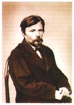 Nikolaj Andreevič Išutin (1840-1879)